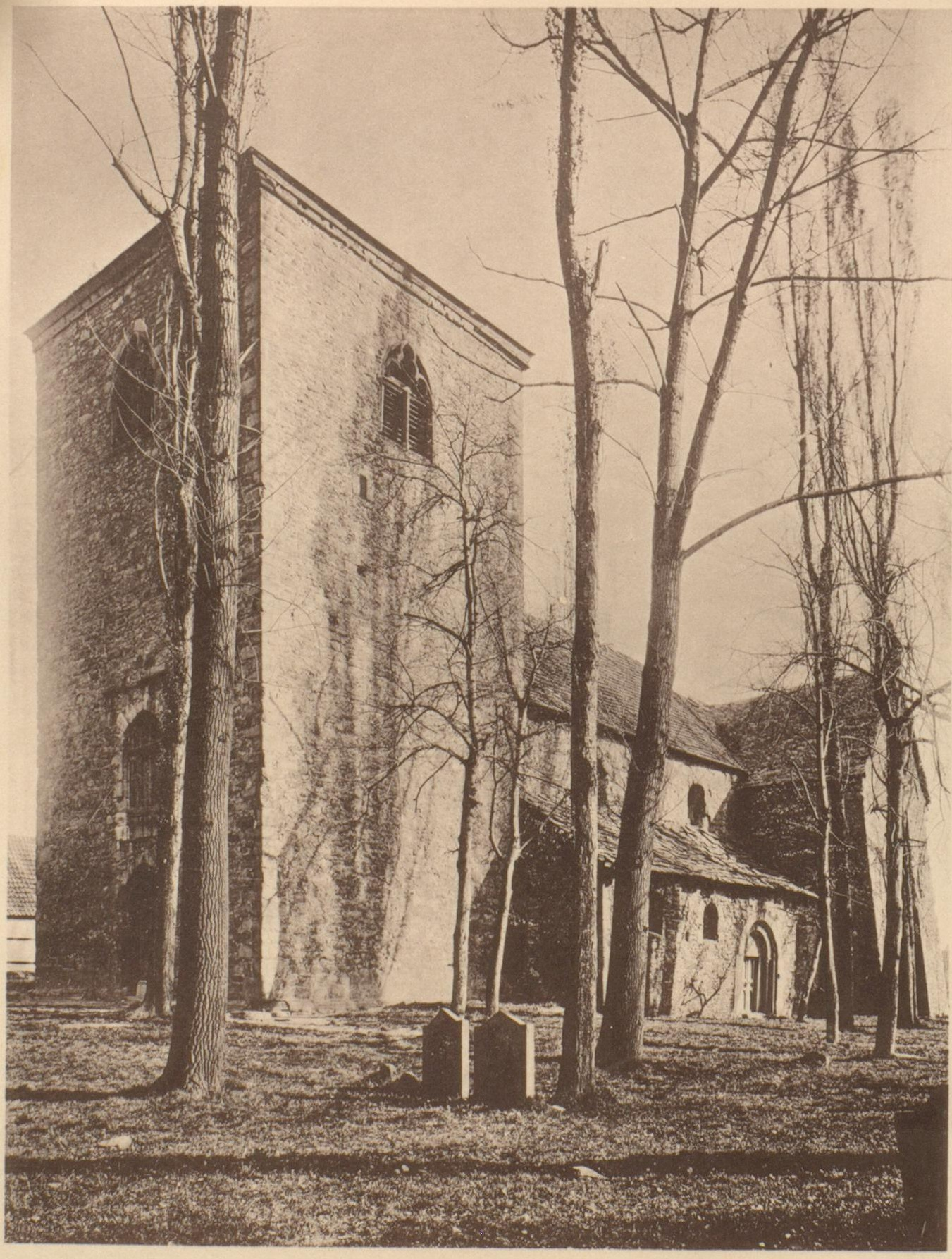 Die Georgskirche in Aplerbeck als verfallene Ruine von der Süd-Westseite im Jahre 1893